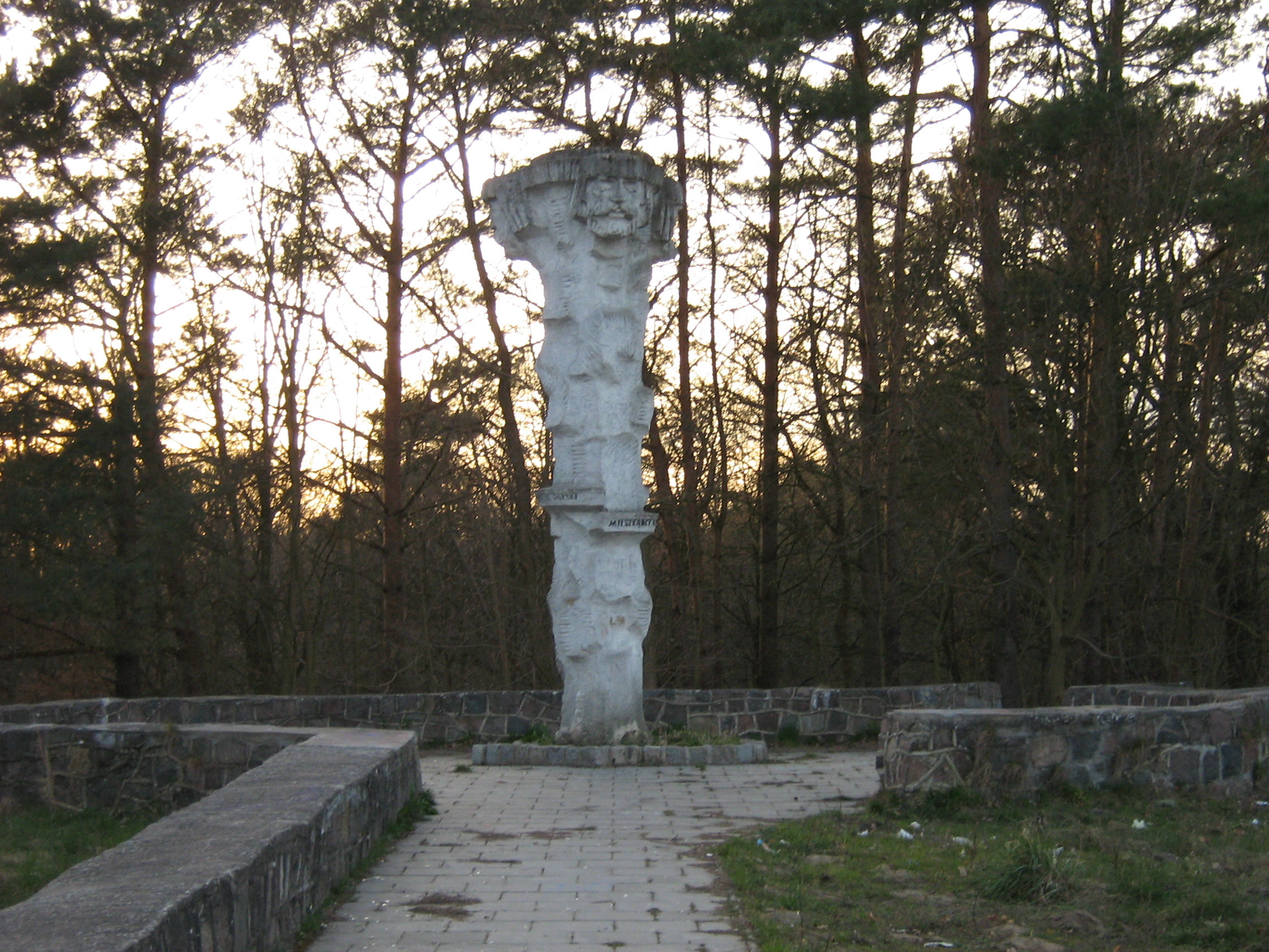 Figura Trygława (Trzygłowa) w parku miejskim w Wolinie